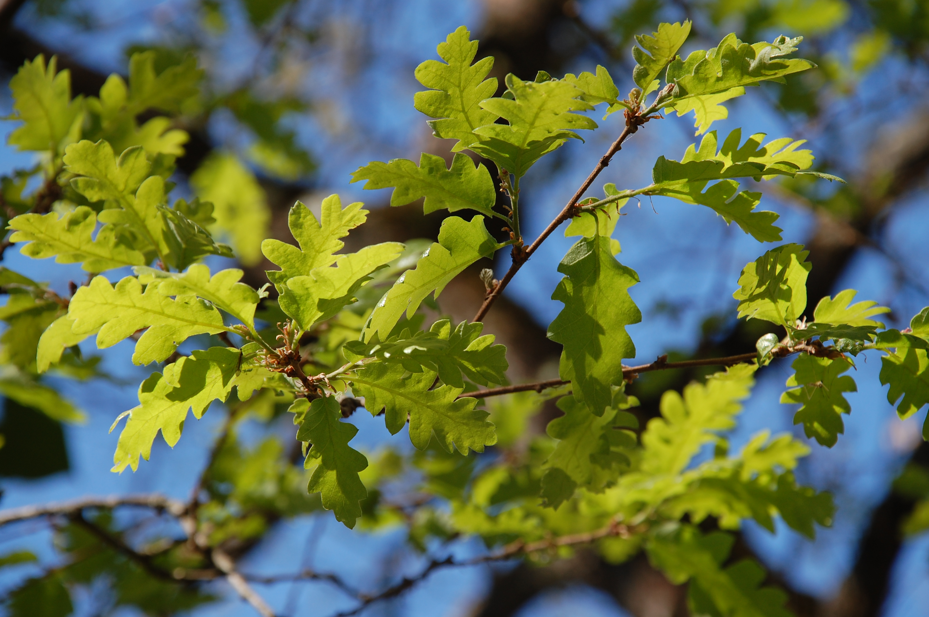 Quercus gussonei (Borzì) Brullo Bosco della Ficuzza, Sicilia